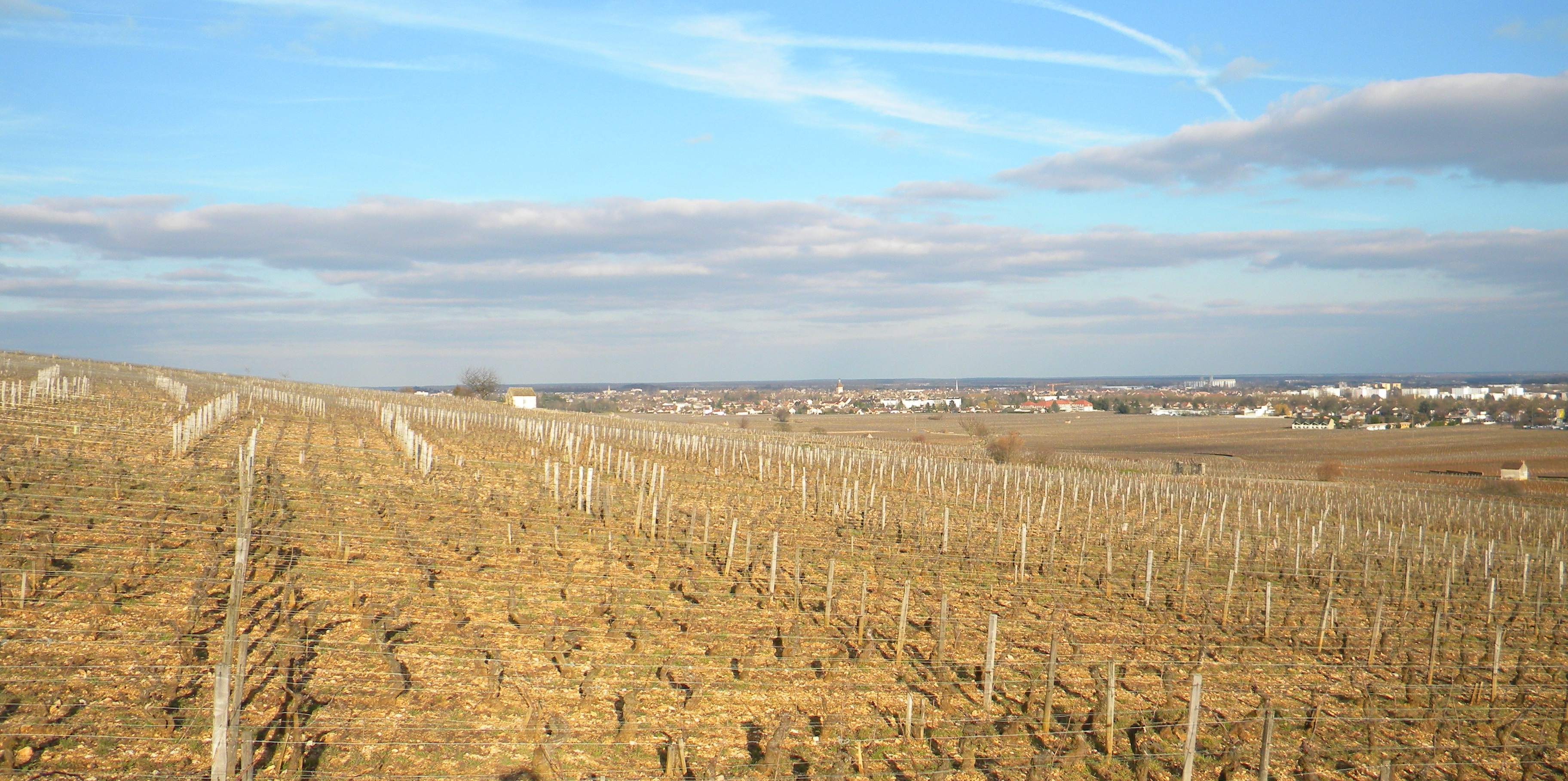 Vignoble de Beaune vue de Pommard